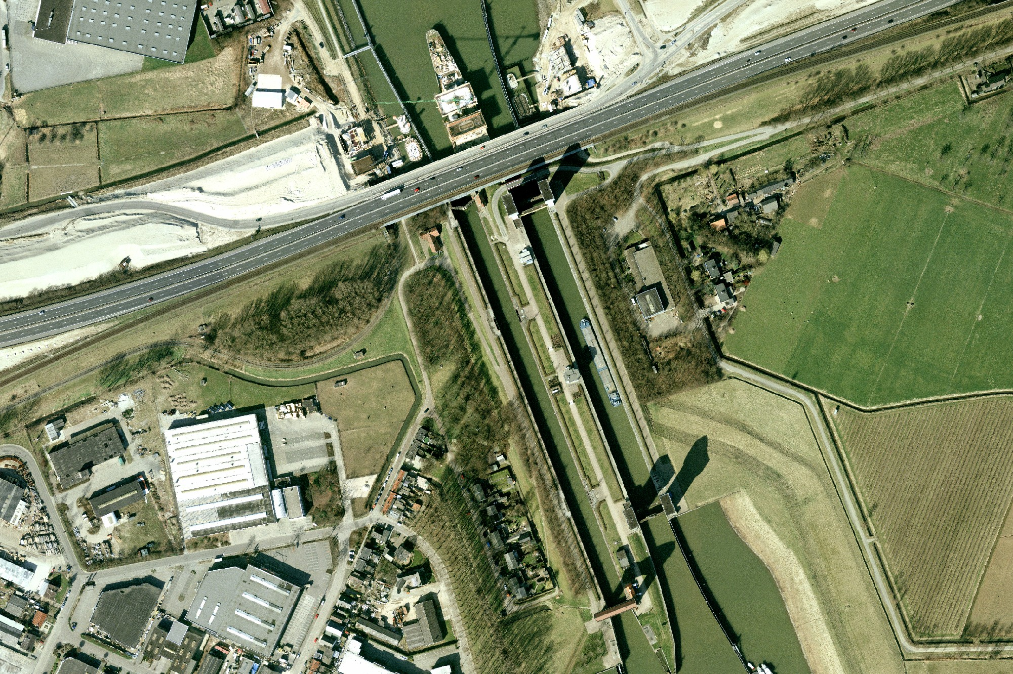 Prins Bernhardsluizen bij Tiel ca. 2003